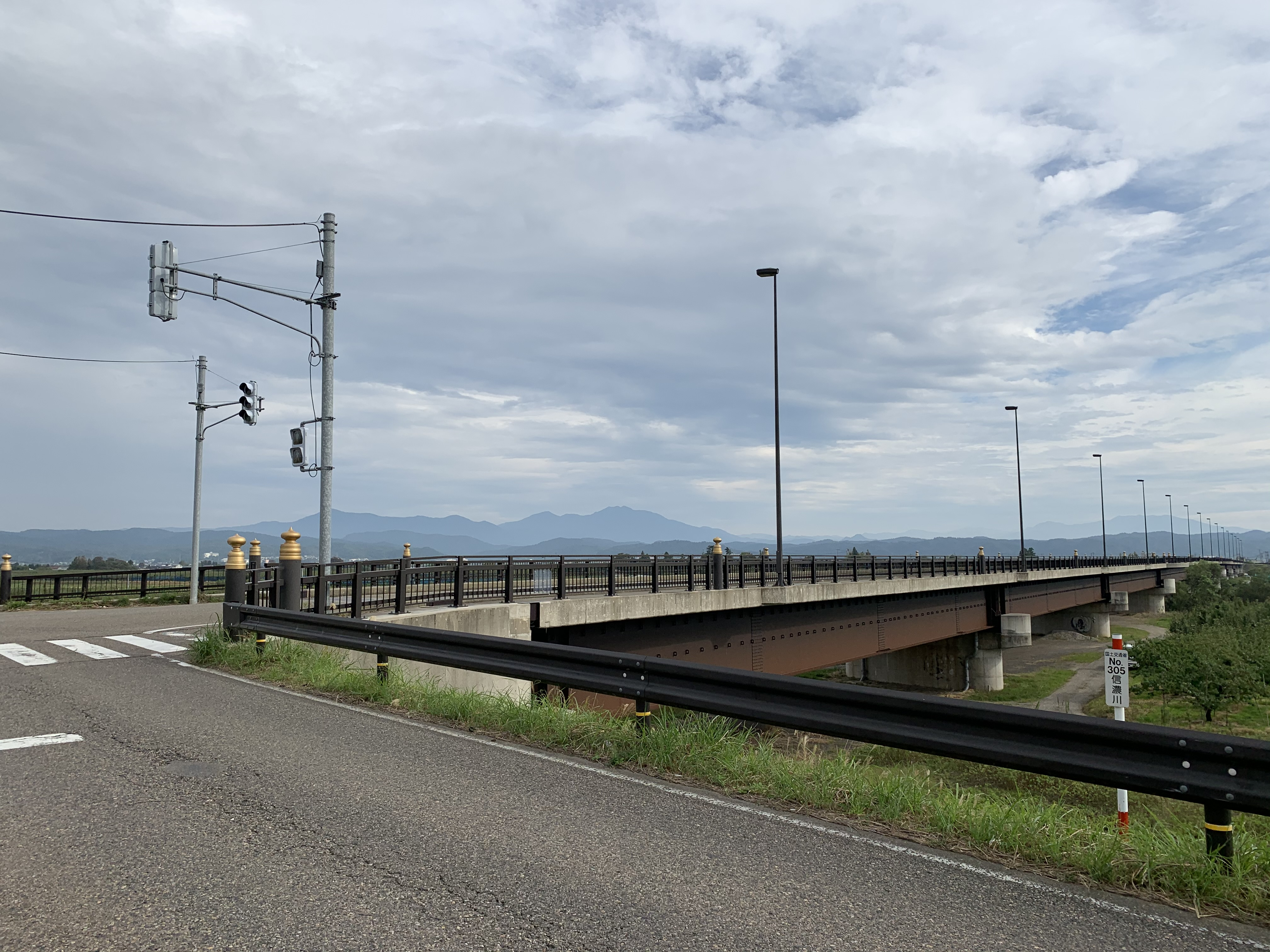 信濃川にかかる加茂大橋を左岸から撮影